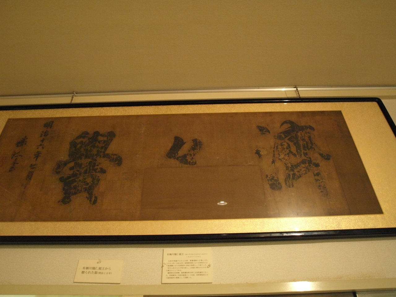 扁額「濟々黌」（有栖川宮熾仁親王書）